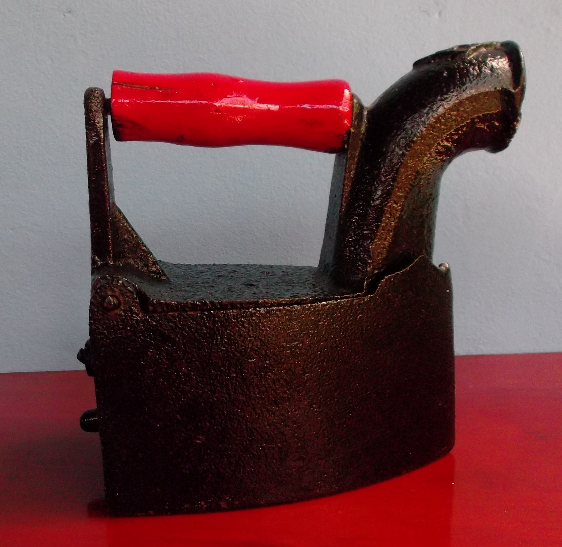 Brasil. Vintage - Antigo Ferro de engomar à carvão vegetal, usado estado do Ceará, no século 20.